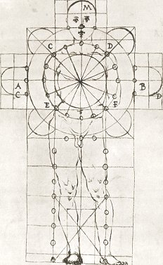 dessin de Francesco di Giorgio Martini -plan d'église anthropomorphique